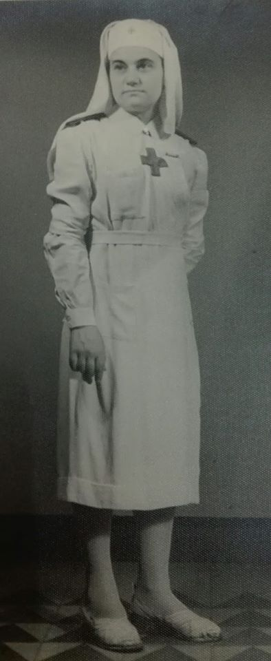 Forwa Solimena (* Napoli, 1912 + Napoli, 1994), in uniforme da Crocerossina del Corpo delle Infermiere Volontarie della Croce Rossa Italiana dujrante il periodo della Seconda Guerra Mondiale (1940-1945).